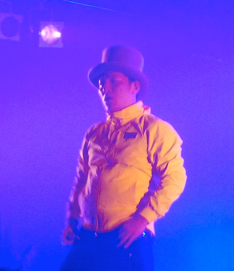 Pierre Taki of Denki Groove fame